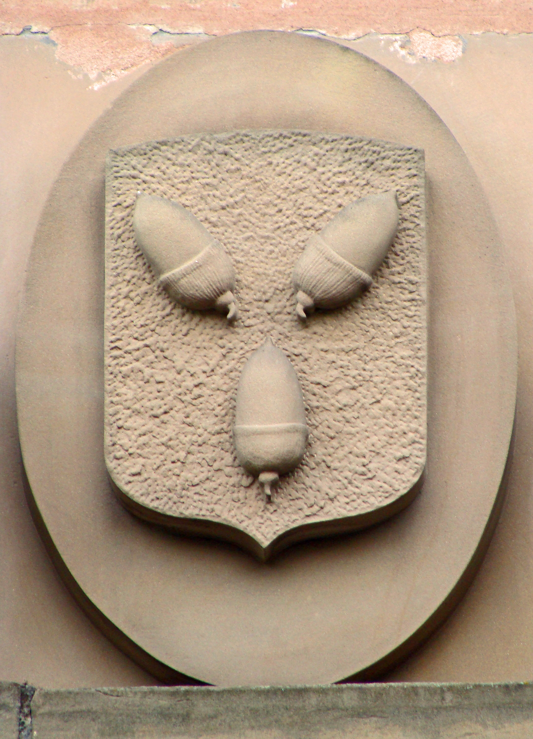 Blason de l'abbaye Saint-Martin-des-Glandières située à Longeville-lès-Saint-Avold.